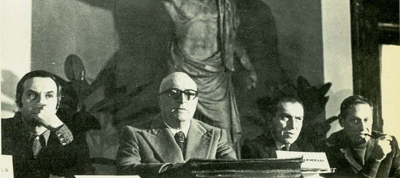 Nella foto, da sinistra, Maurizio Liverani, Luigi Volpicelli, il Presidente del Sindacato Libero Scrittori, onorevole Dino Del Bo ed il Segretario del Sindacato, Francesco Grisi. Convegno organizzato dal Sindacato Libero Scrittori sul tema «Cultura e violenza», Roma, Palazzo Braschi, il 1° e il 2 febbraio 1975.